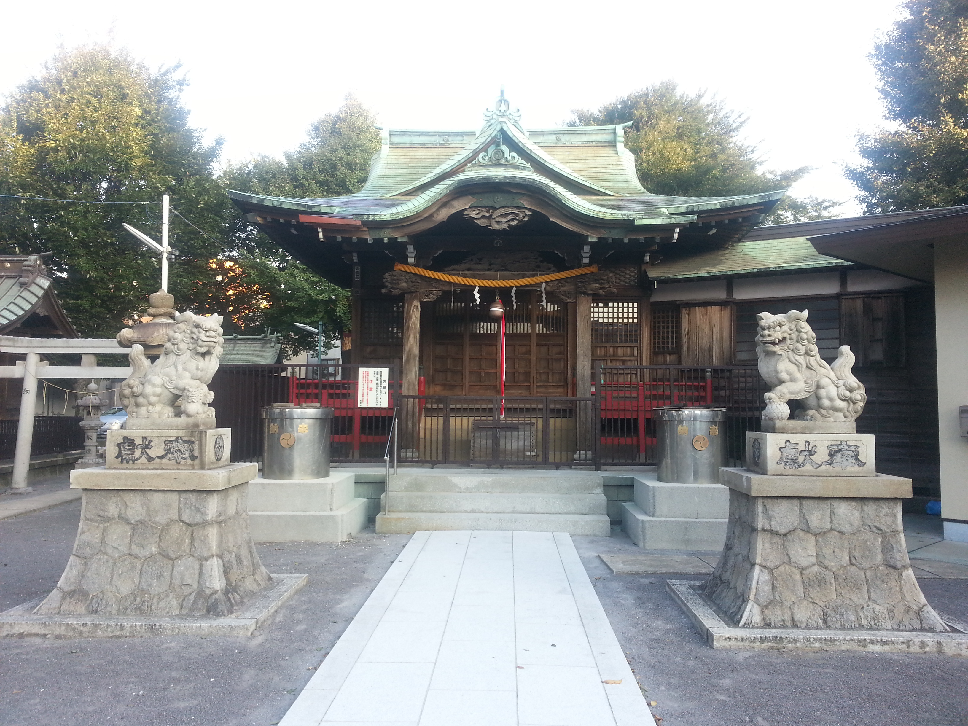 東京都大田区北糀谷にある子安八幡神社の拝殿。